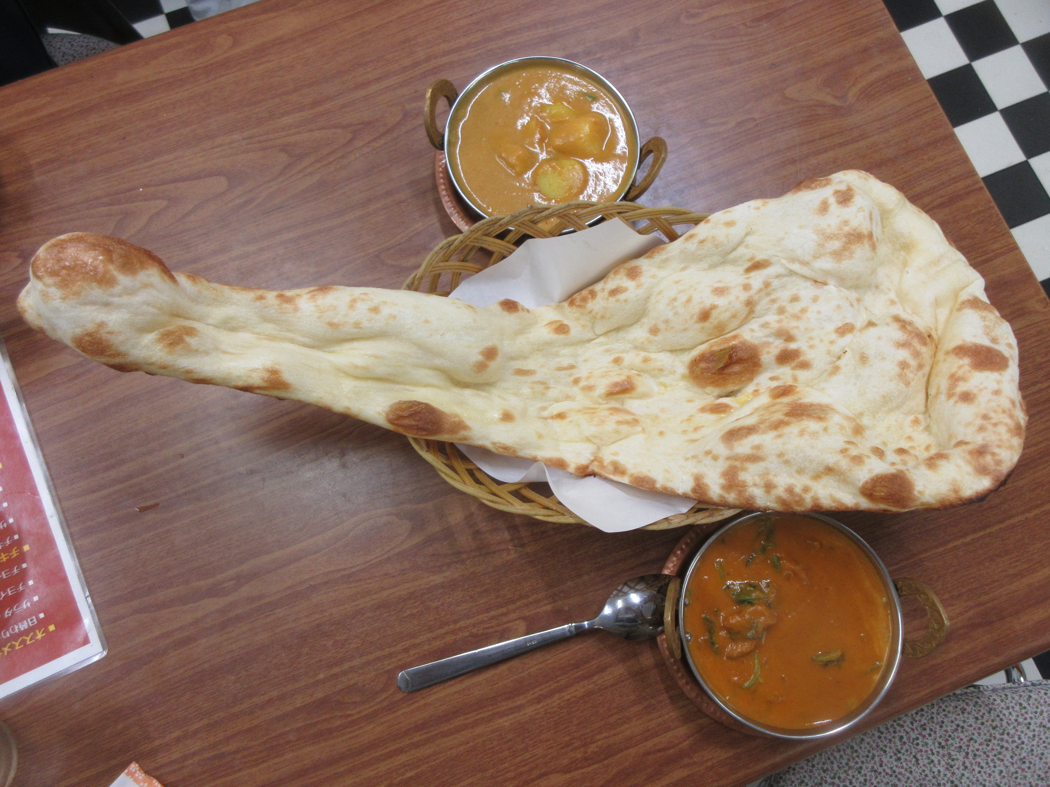 ナンとカレー。日本国内の飲食店にて。